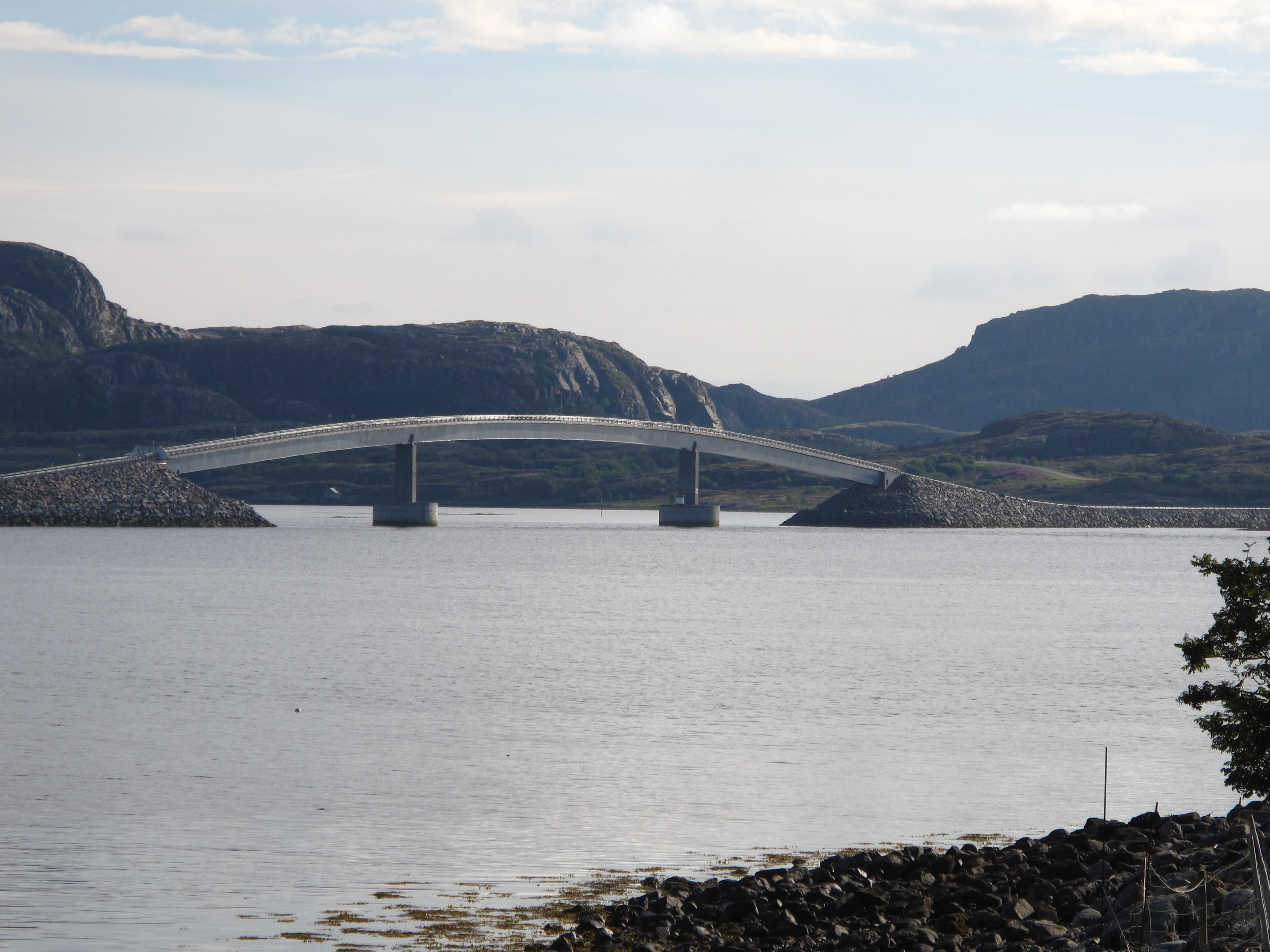 Linesbrua